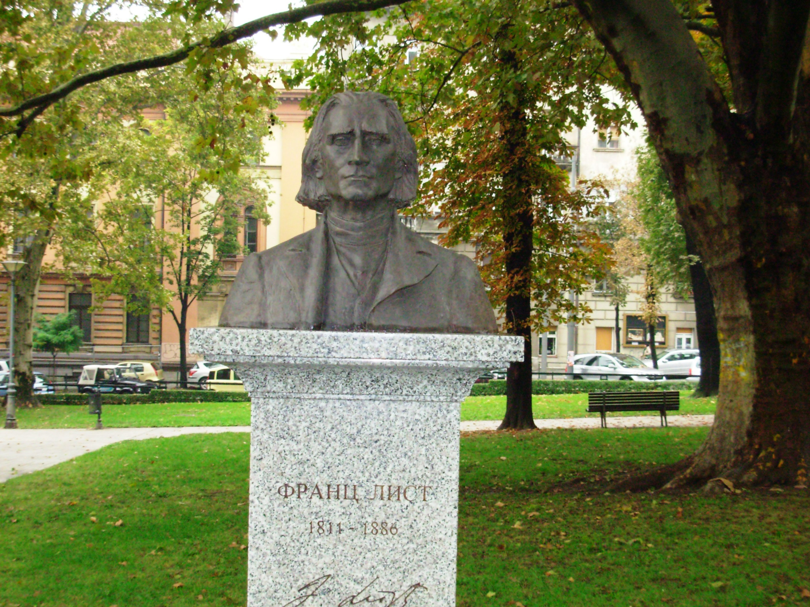 Franc List, novopostavljeni spomenik u parku Manjež u Beogradu. Slikao Goldfinger